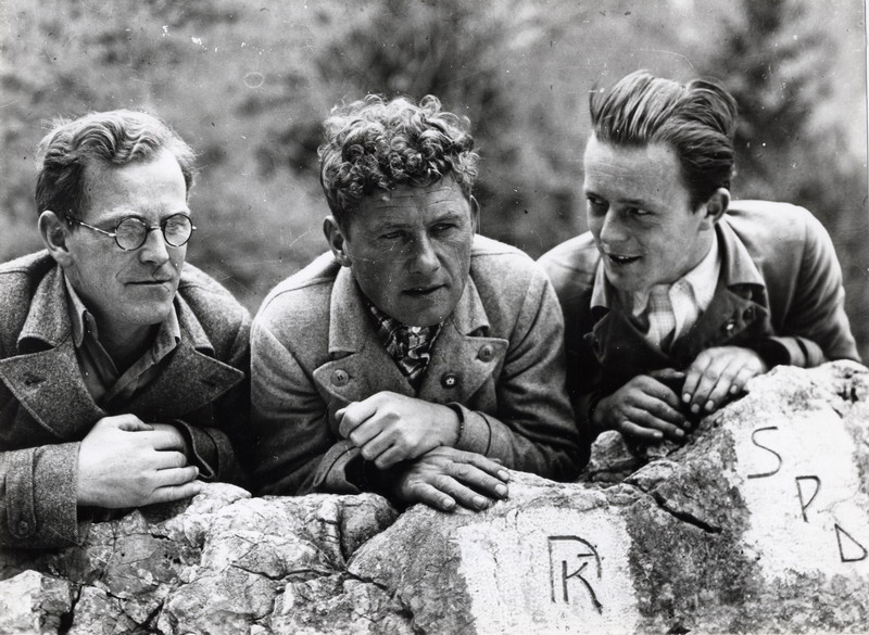 Od leve proti desni: Stanko Tominšek, Joža Čop in Miha Potočnik